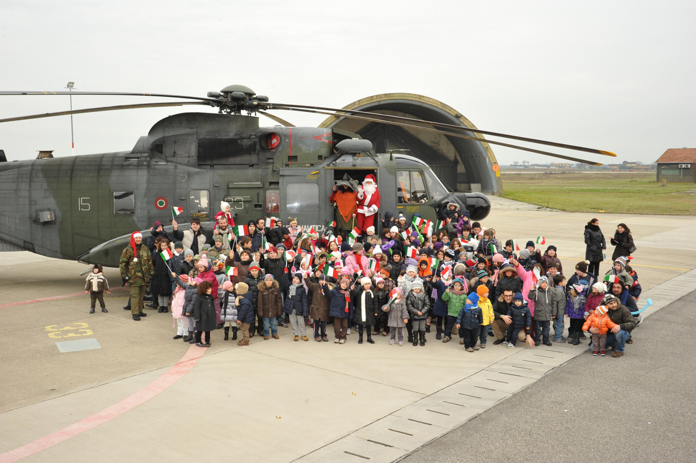 Foto scattata in occasione della Befana del 15º Stormo del 2011